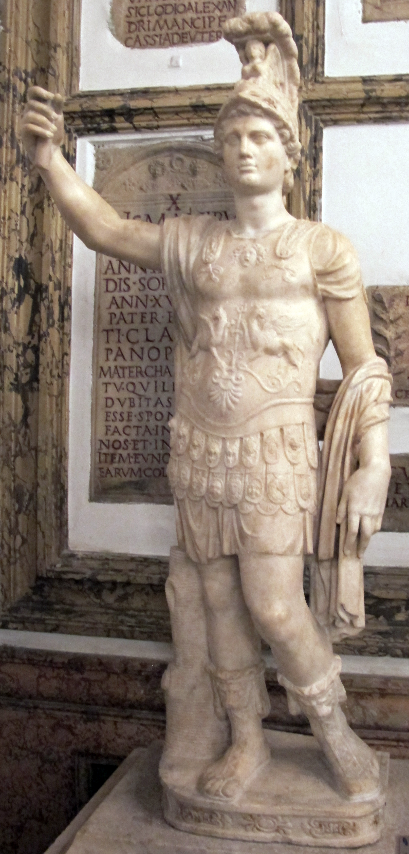 Musei Capitolini. Statua loricata, c.d. "Alessandro", età flavia-traianea. Inventario Sculture S 719.